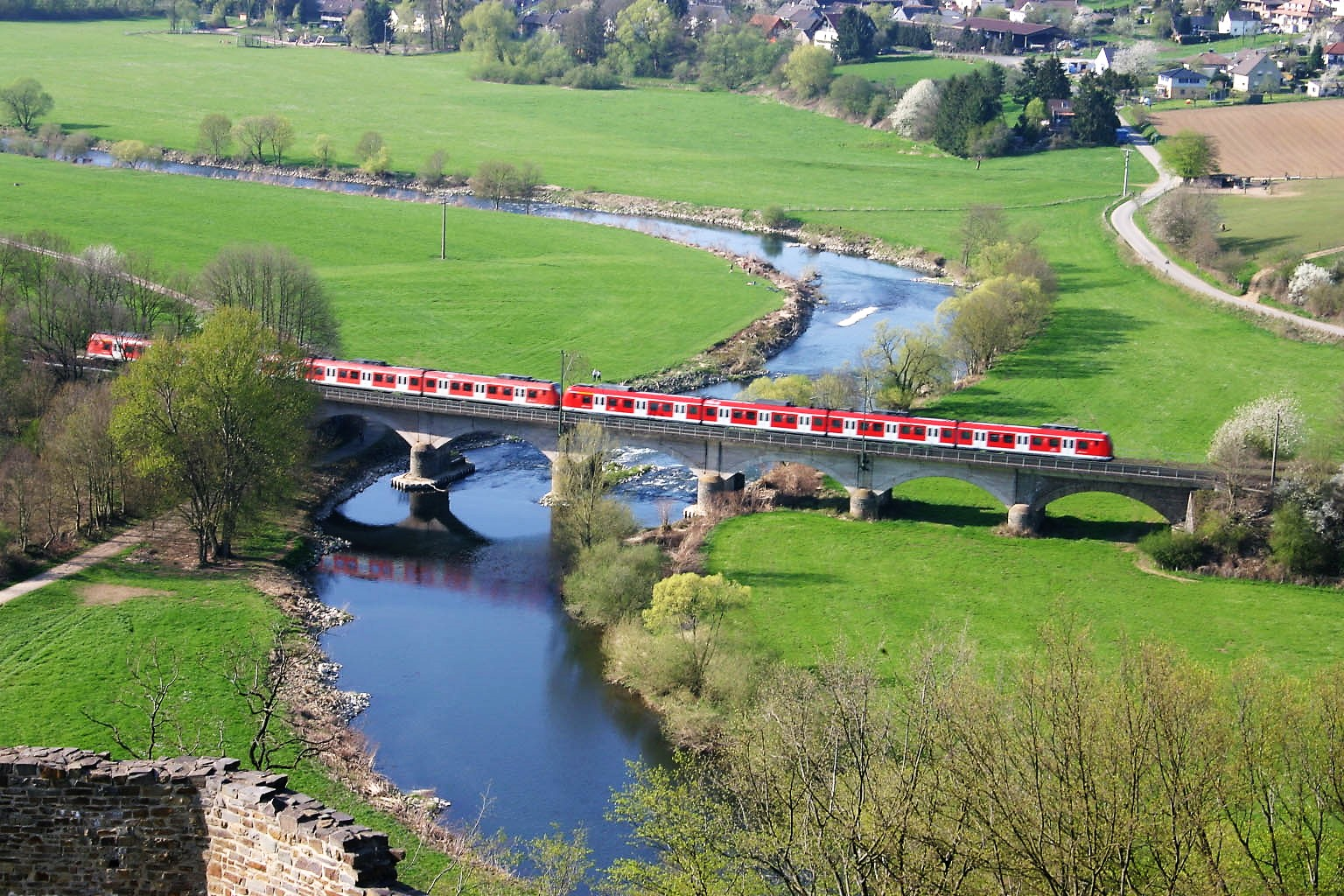 Siegschleife und S-Bahn Rhein-Ruhr (Siegstrecke).